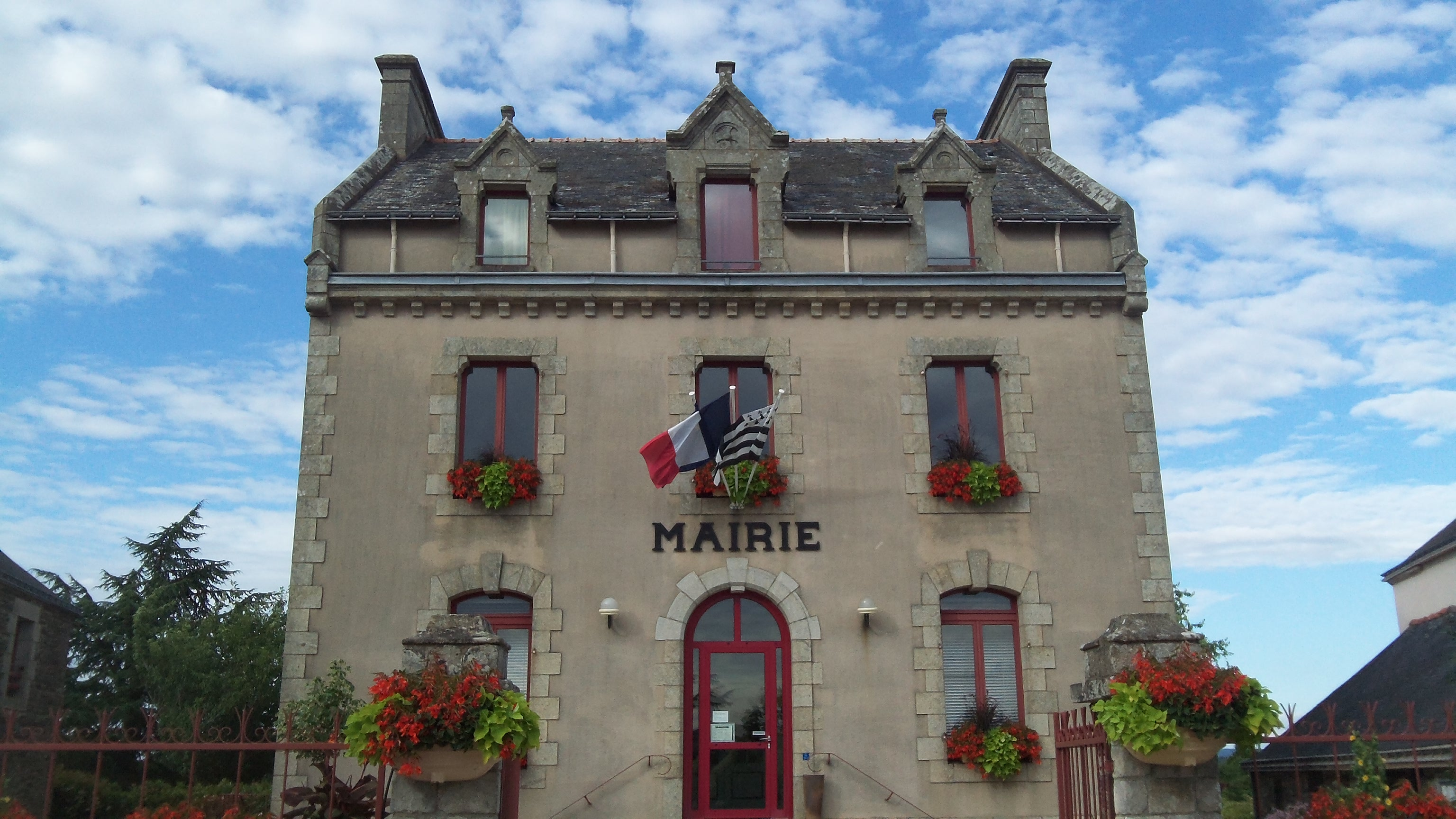 Mairie de la commune de Loyat, dans le Canton de Ploërmel.